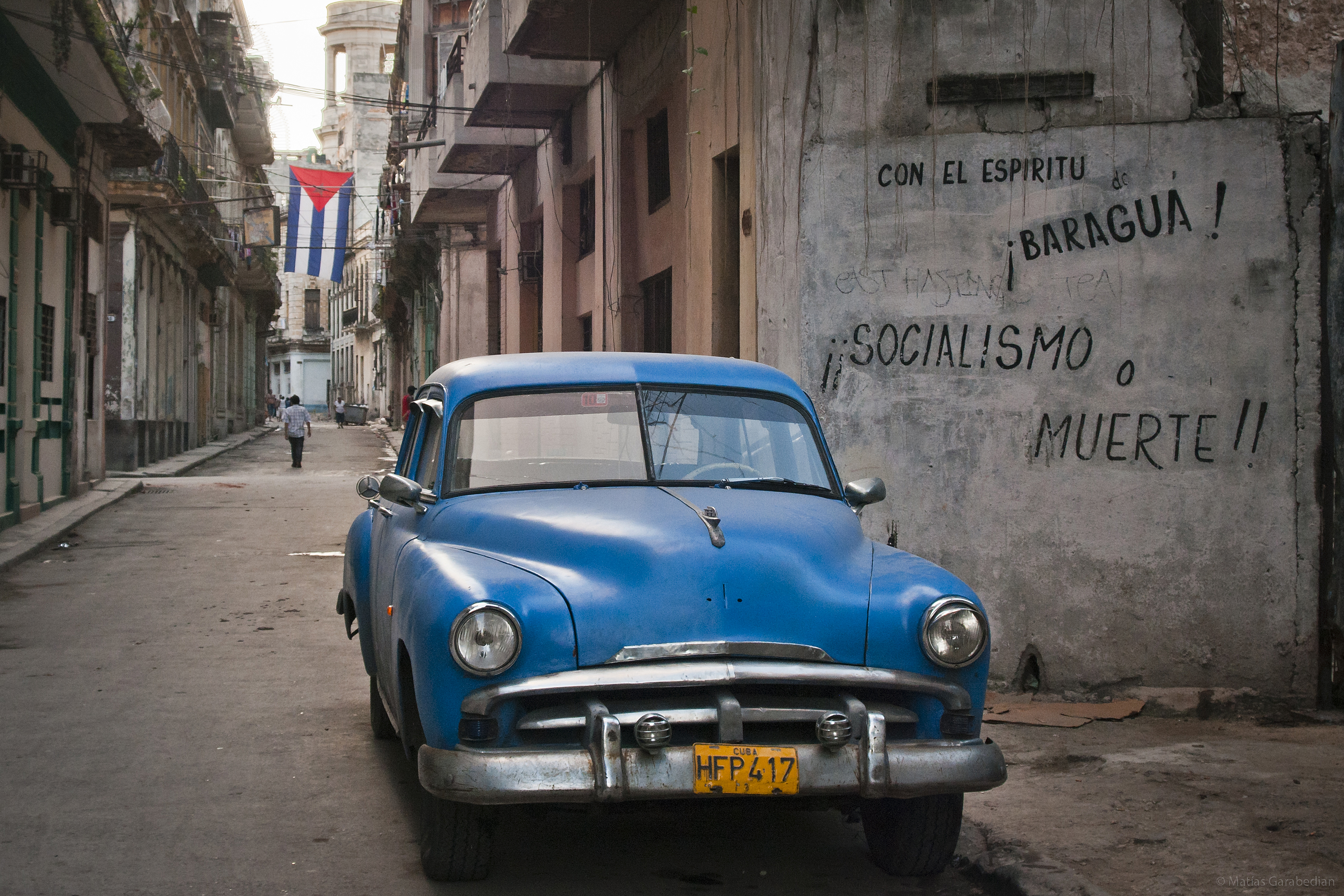 Une petite promenade à travers le cœur de La Havane.